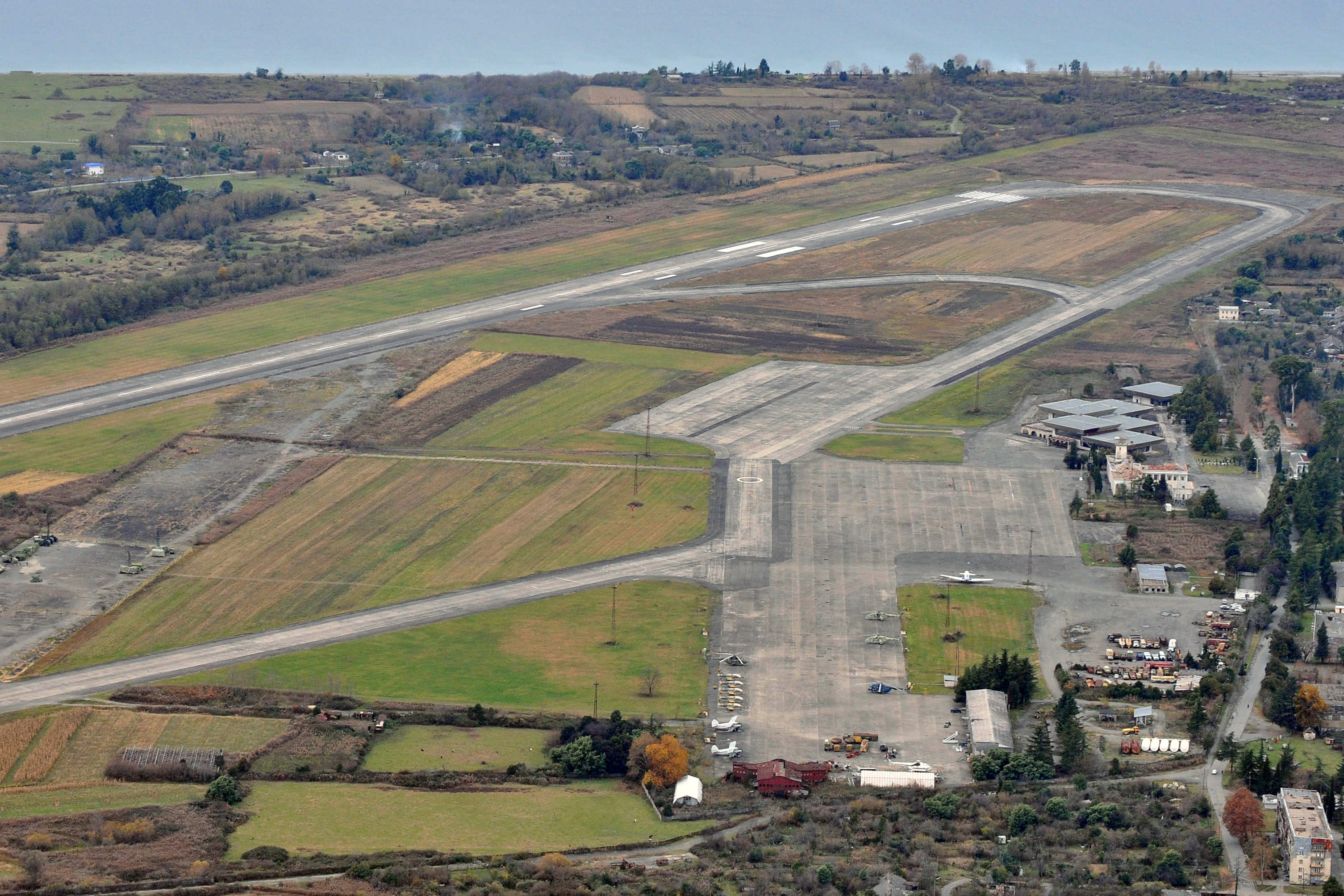 Аэропорт Бабушера с воздуха